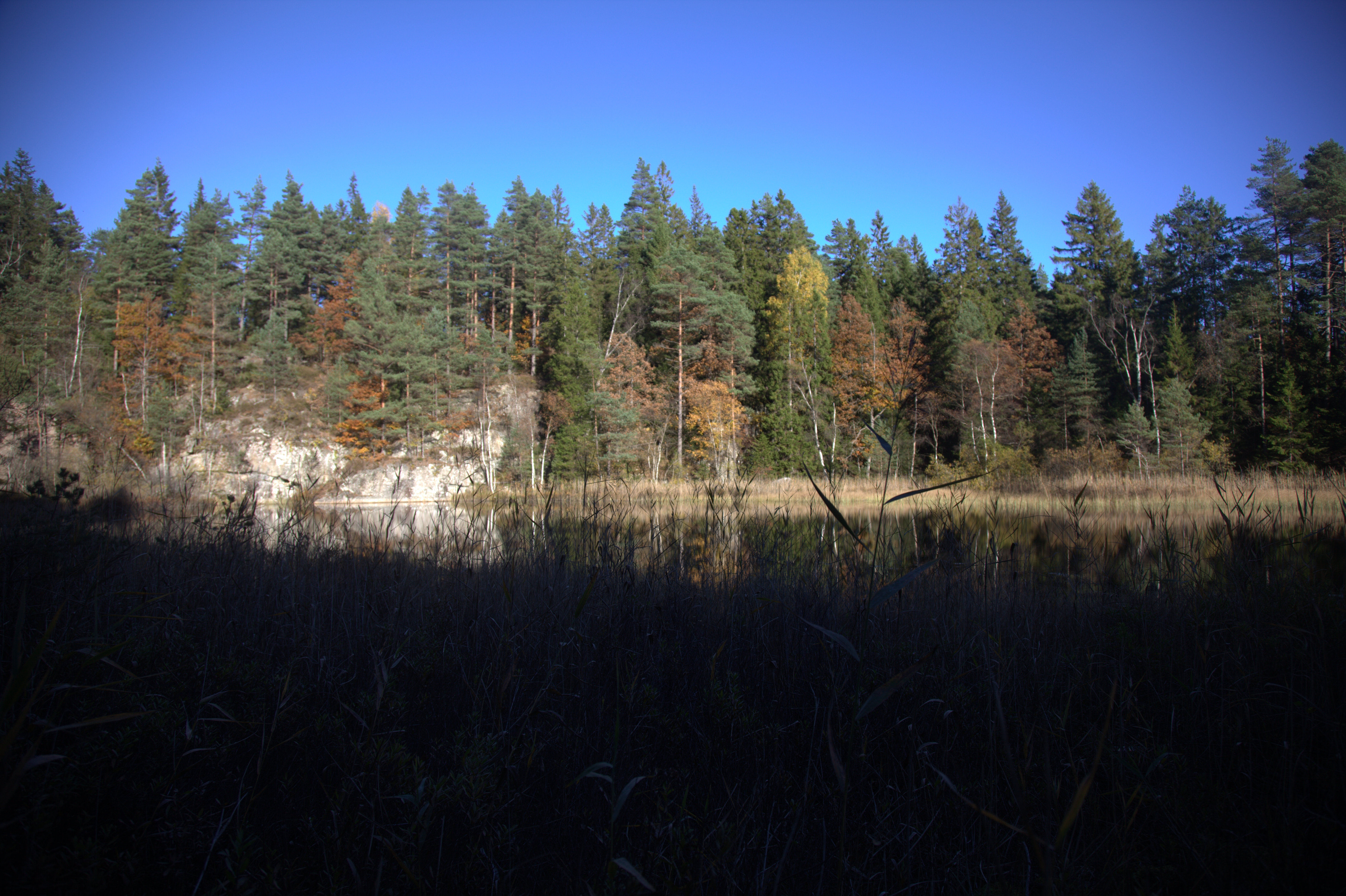 Lilla Nöjevatten i Kungälvs kommun